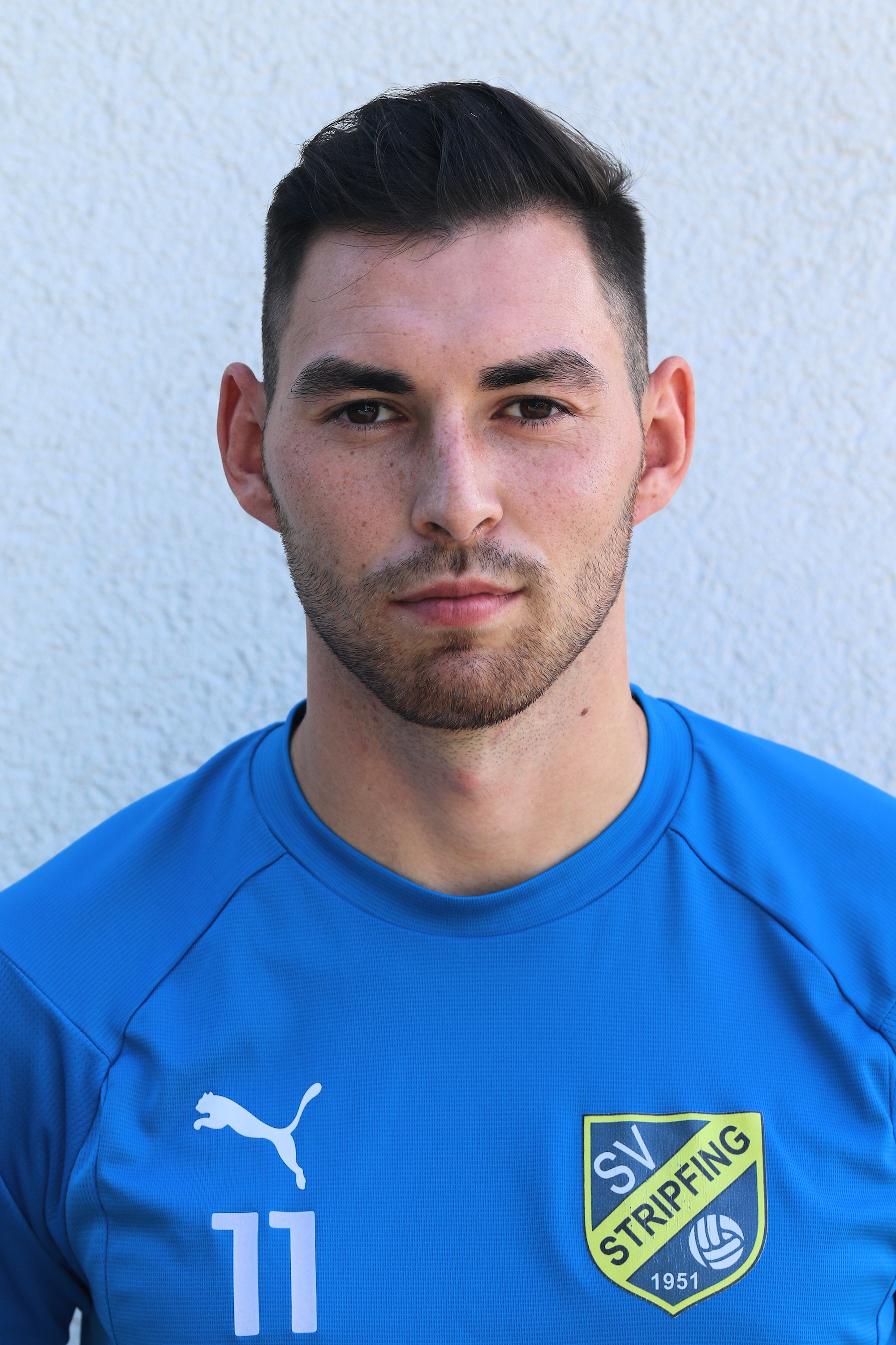 Meisterschaftsspiel der Regionalliga Ost 2019/20 SC Wiener Neustdat (weiße Trikots) gegen SV Stripfing (gelbe Trikots) am 17. August 2019 1:1 (1:0). – Das Bild zeigt Nico Löffler (SV Stripfing).